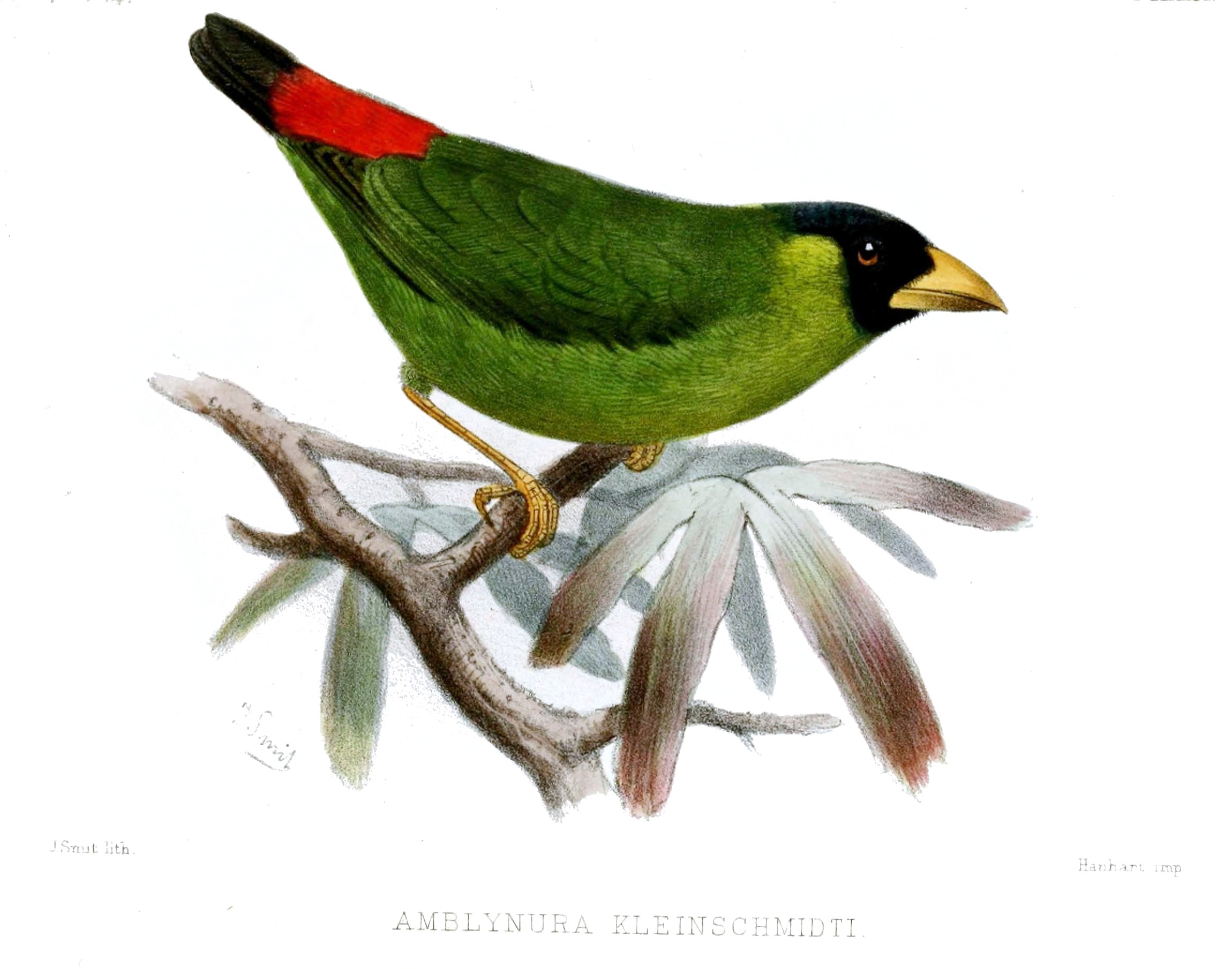 Amblynura kleinschmidti (=Erythrura kleinschmidti)